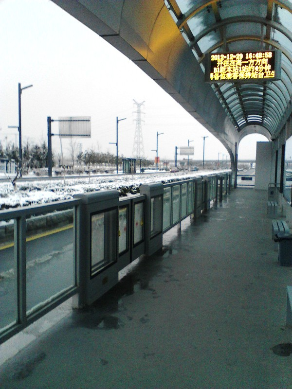 连云港BRT站台。